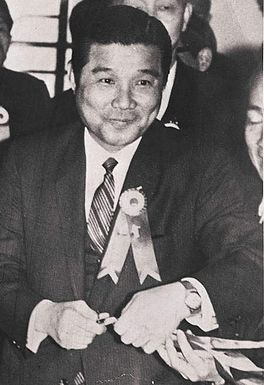 Lui Lok (1920-2010)